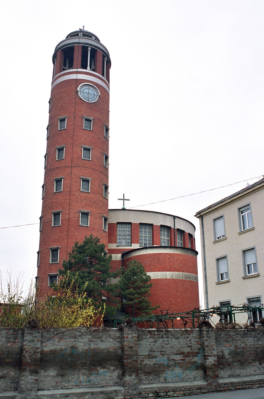 Српски (ћирилица): Торањ цркве